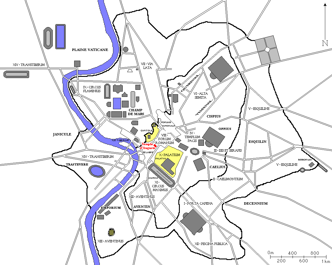 Plan de Rome redessiné. Tous les bâtiments importants construits jusqu'à la fin de l'Empire romain sont dessinés, ainsi que les régions d'Auguste et les collines de Rome. Le temple d'Auguste est en rouge.